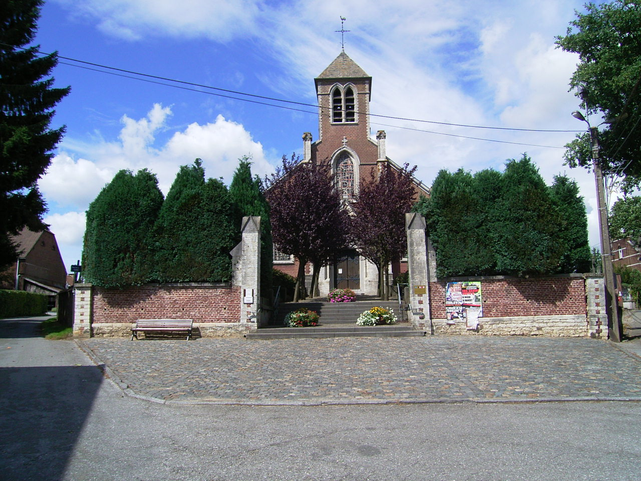 Eglise Saint Ulric de Malèves-Ste-Marie-Wastines